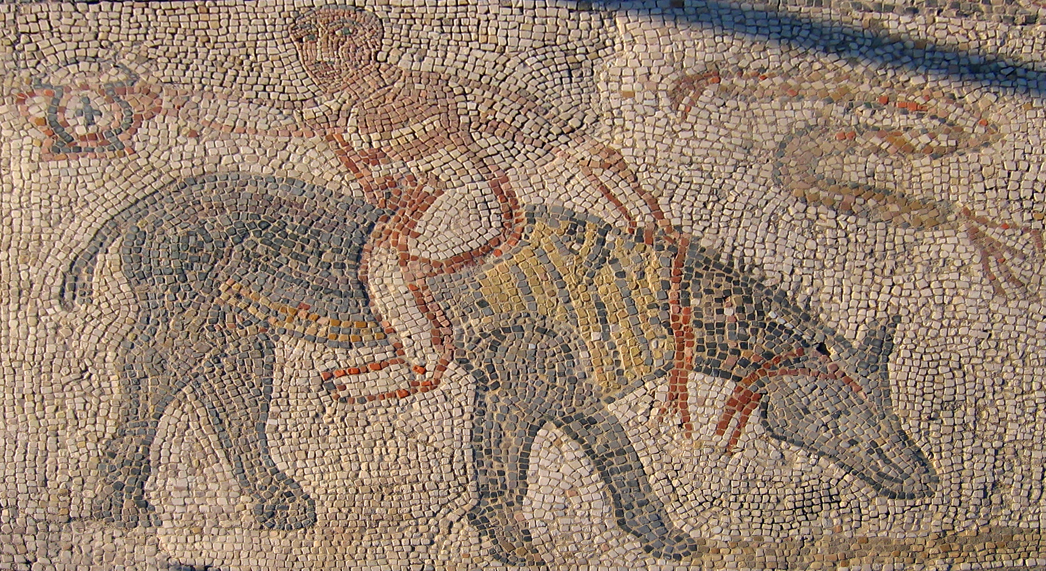 Homme à cheval sur un ane. mosaïque de Volubilis (Maroc)